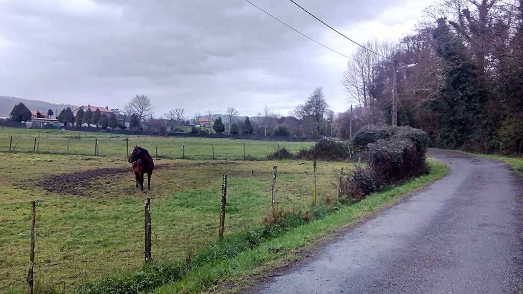 Vista da Revolta, Pedroso, Narón.